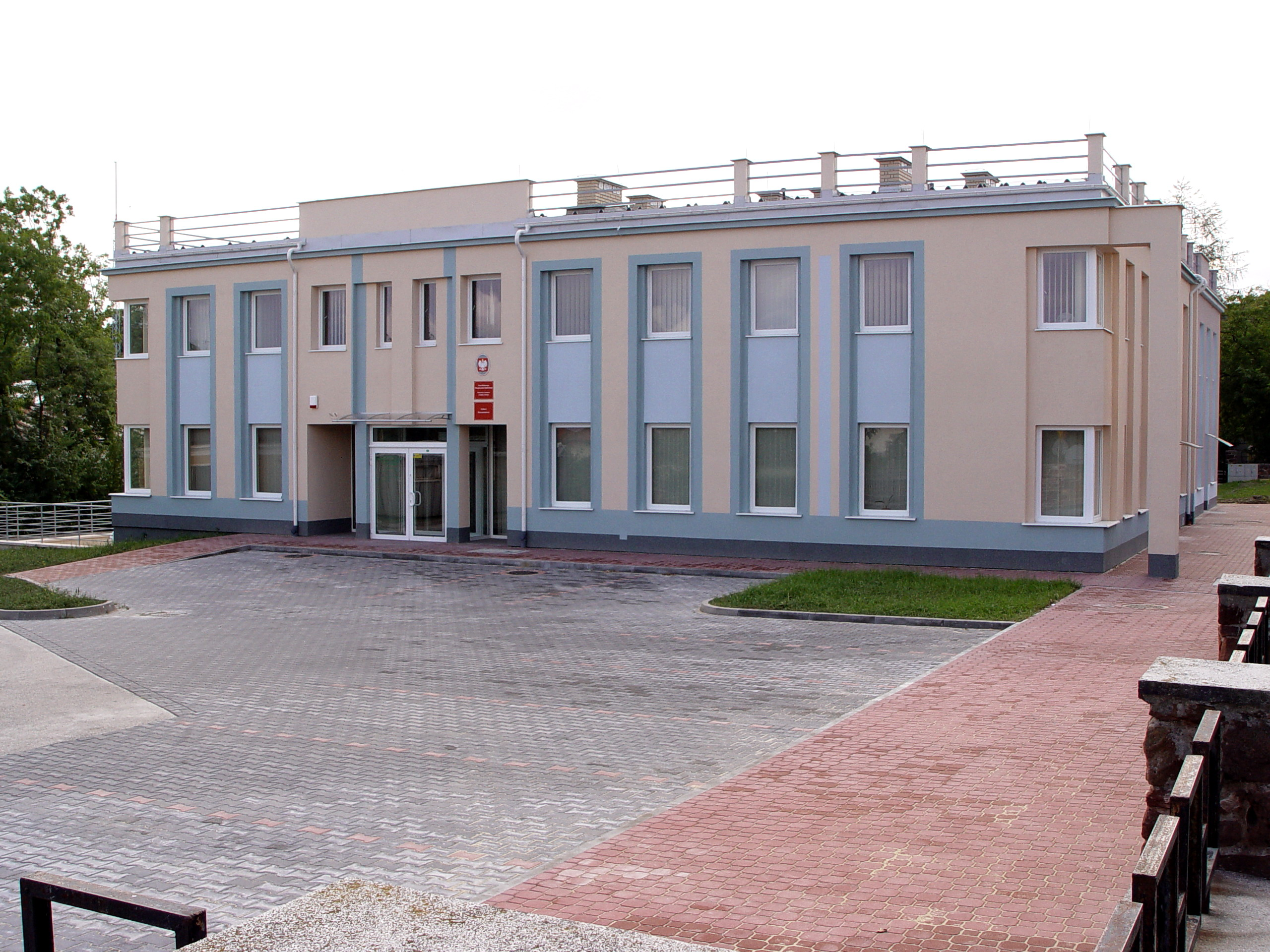 Nowa siedziba KRUS, Busko Zdrój, Armii Krajowej 17